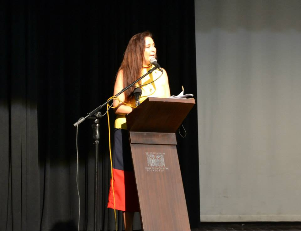 Karina Gálvez, poetisa ecuatoriana, presidenta del II Congreso Literario Internacional por la Identidad de los Pueblos y la Paz